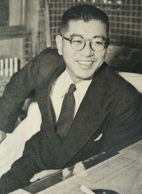 宮崎四郎（名古屋市警察本部長）